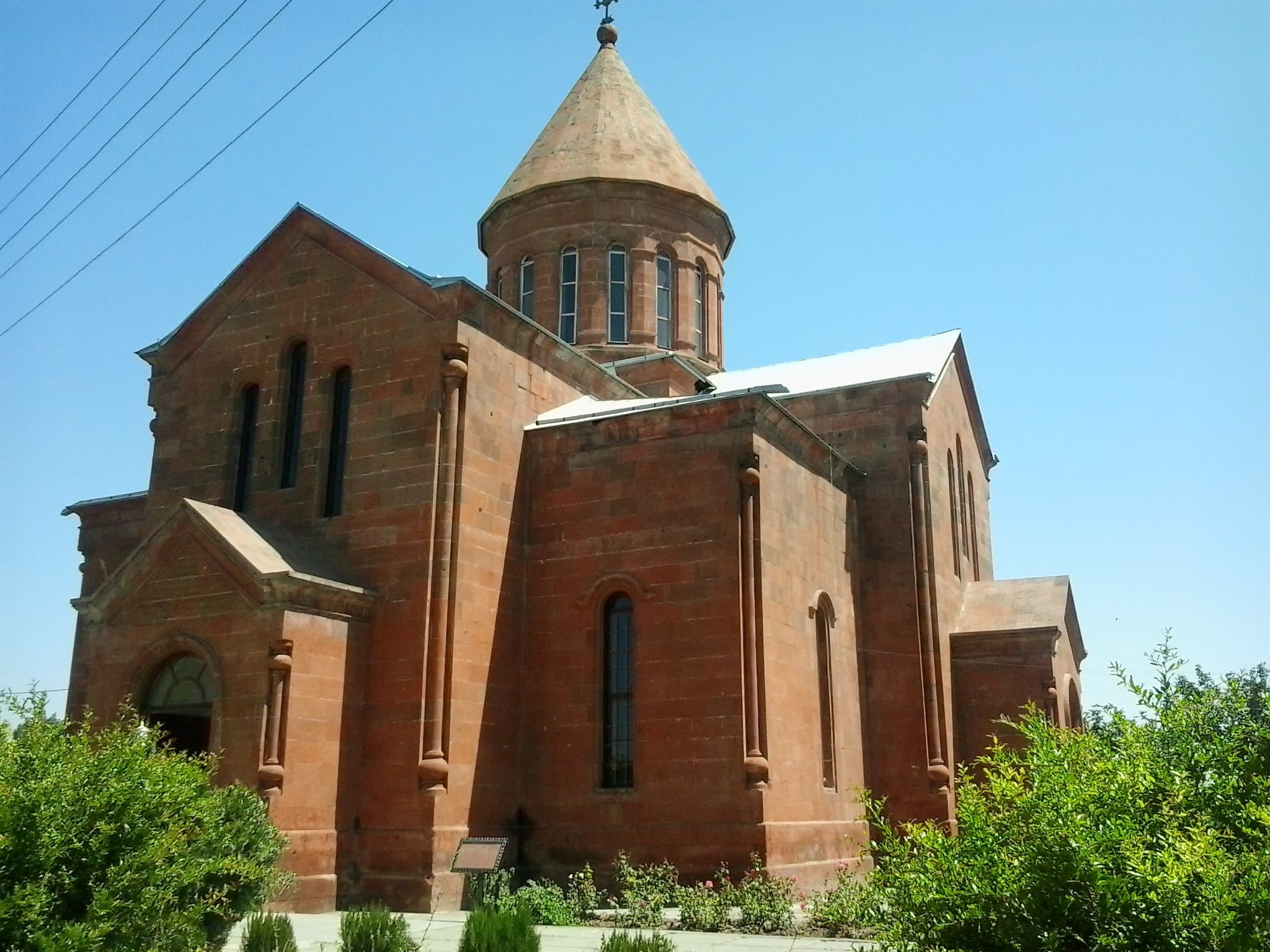 Գտնվում է ՀՀ Արմավիրի մարզի Բամբակաշատ գյուղում: Կառուցվել է 1901թ. 31/1